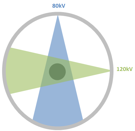 DSCT